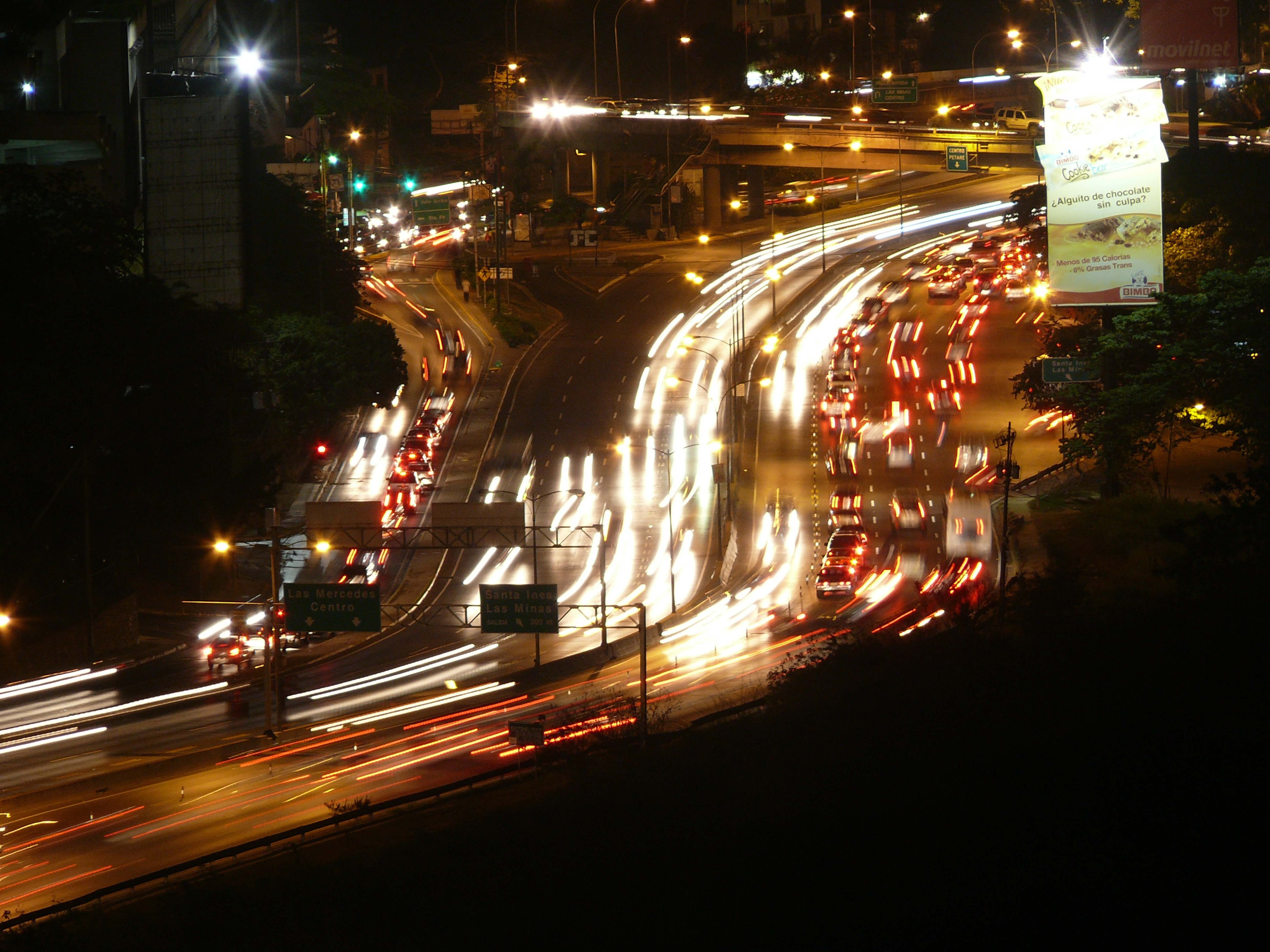 Autopista Prados del Este de noche - Caracas